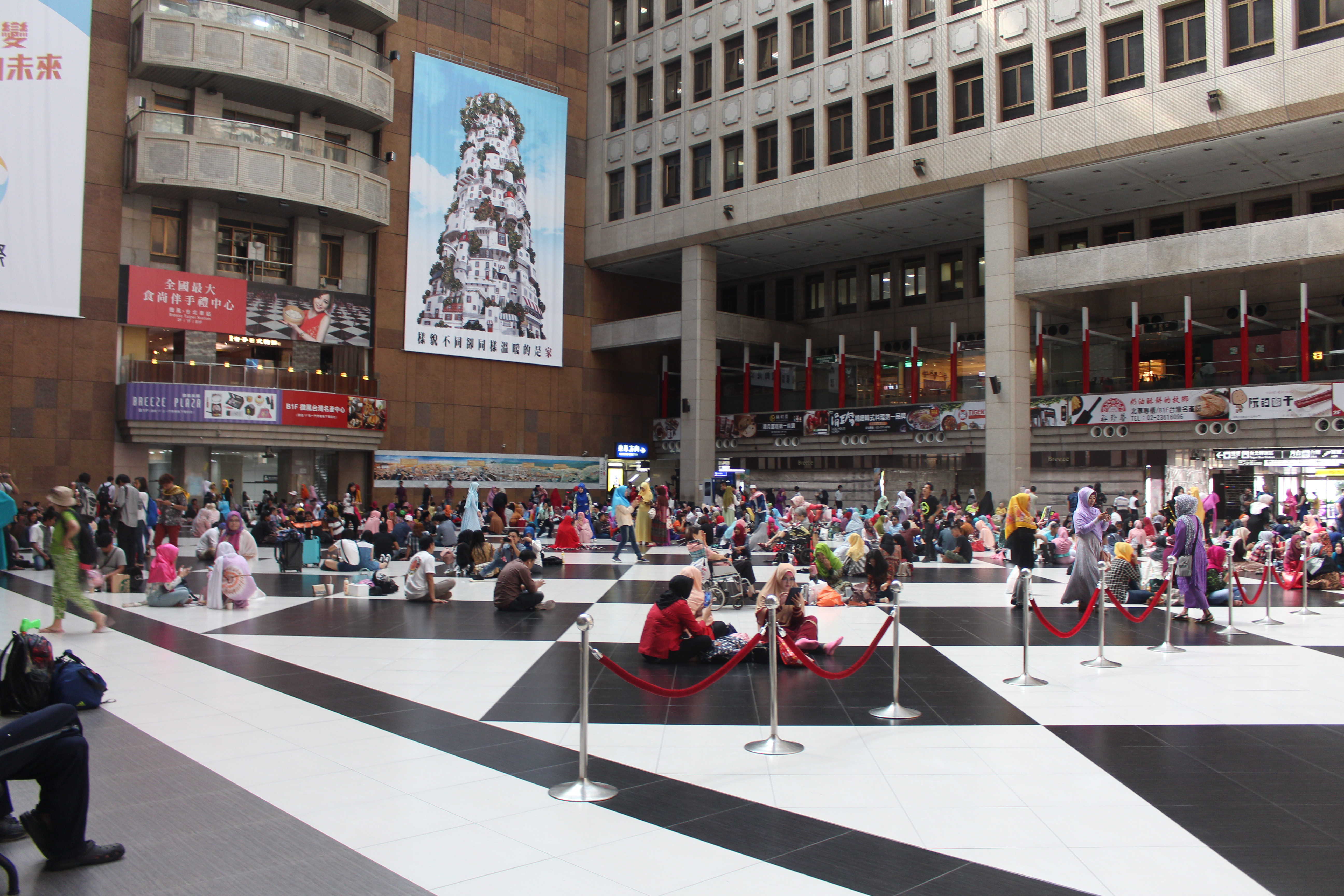 適逢開齋節 Id al-Fitr